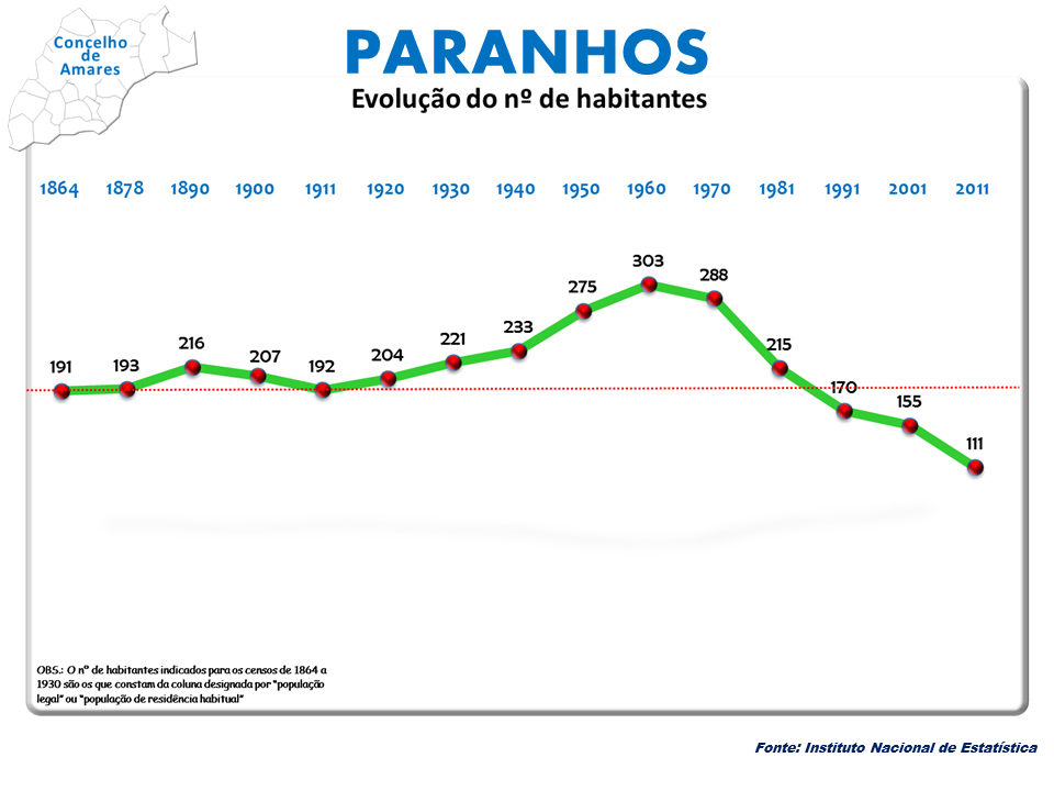 Censo 2011